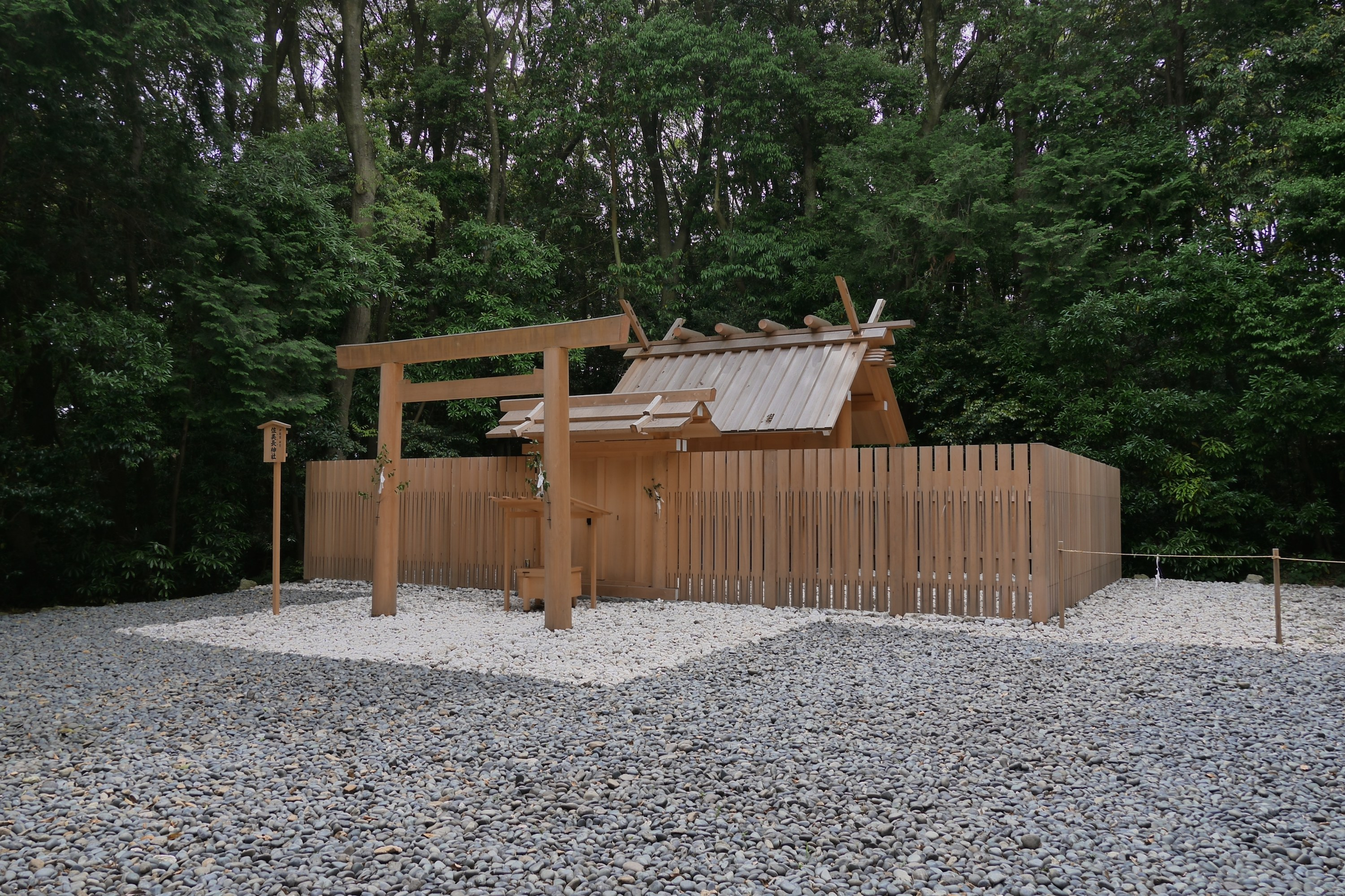 日本の三重県志摩市にある皇大神宮別宮伊雑宮所管社佐美長神社（さみながじんじゃ）の社殿